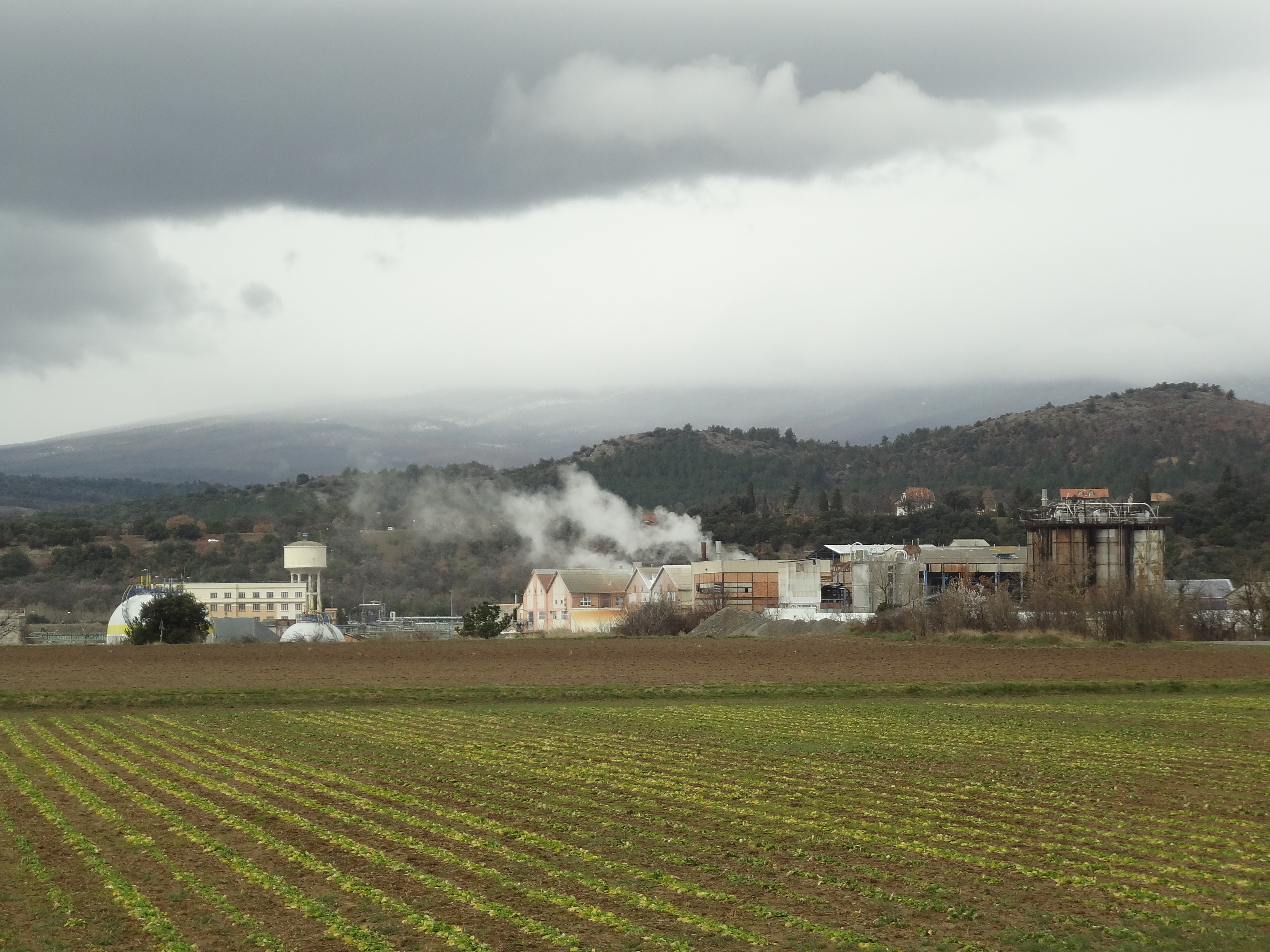 usine Arkema de Château-Arnoux-Saint-Auban